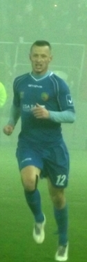 Zdjęcie zrobione podczas meczu polskiej I Ligi piłkarskiej, pomiędzy Cracovią a Miedzią Legnica. #34 Łukasz Zejdler, #12 Krzysztof Wołczek